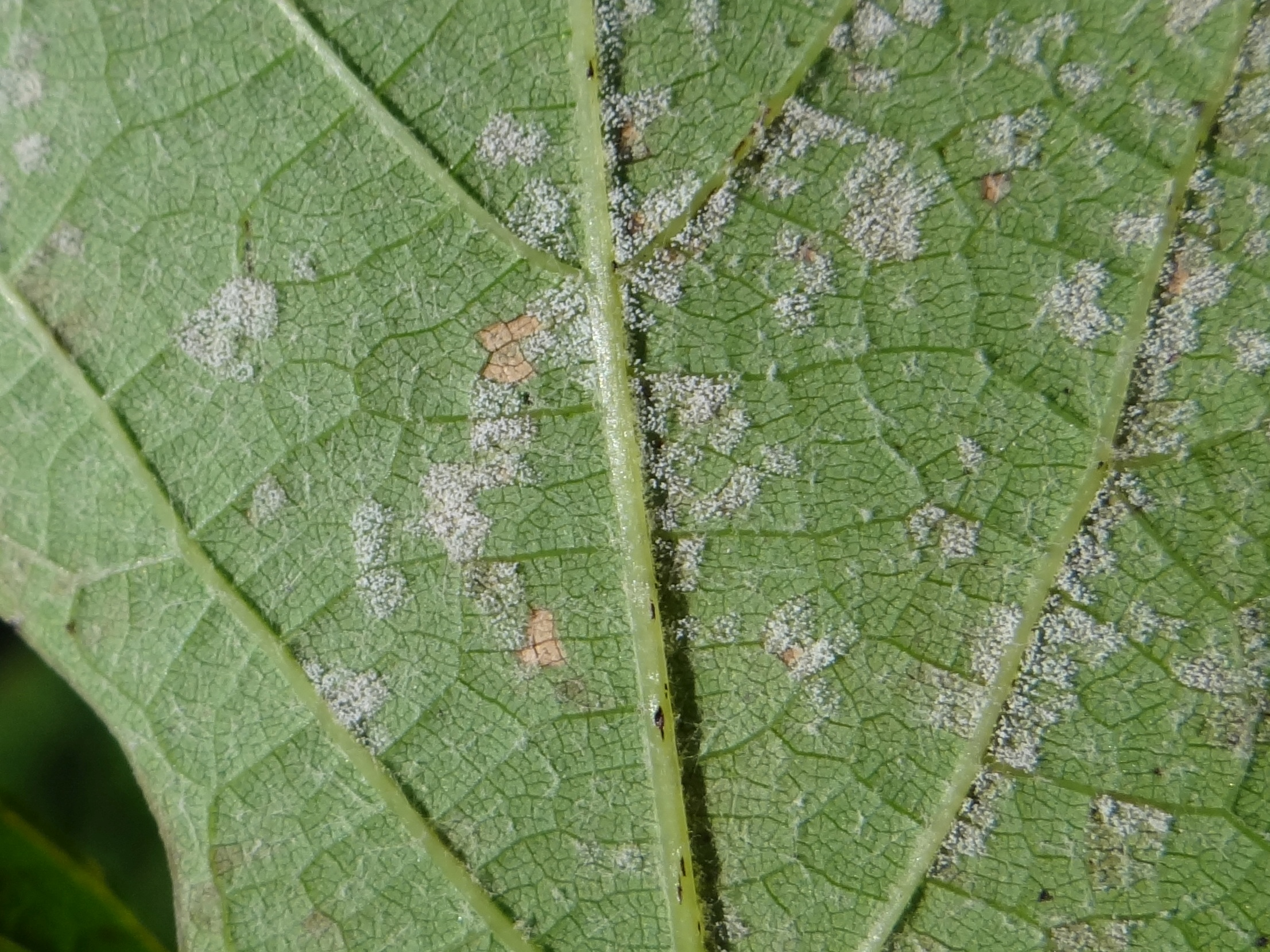 Podosphaera fusca on Cucurbita pepo var giromontiina